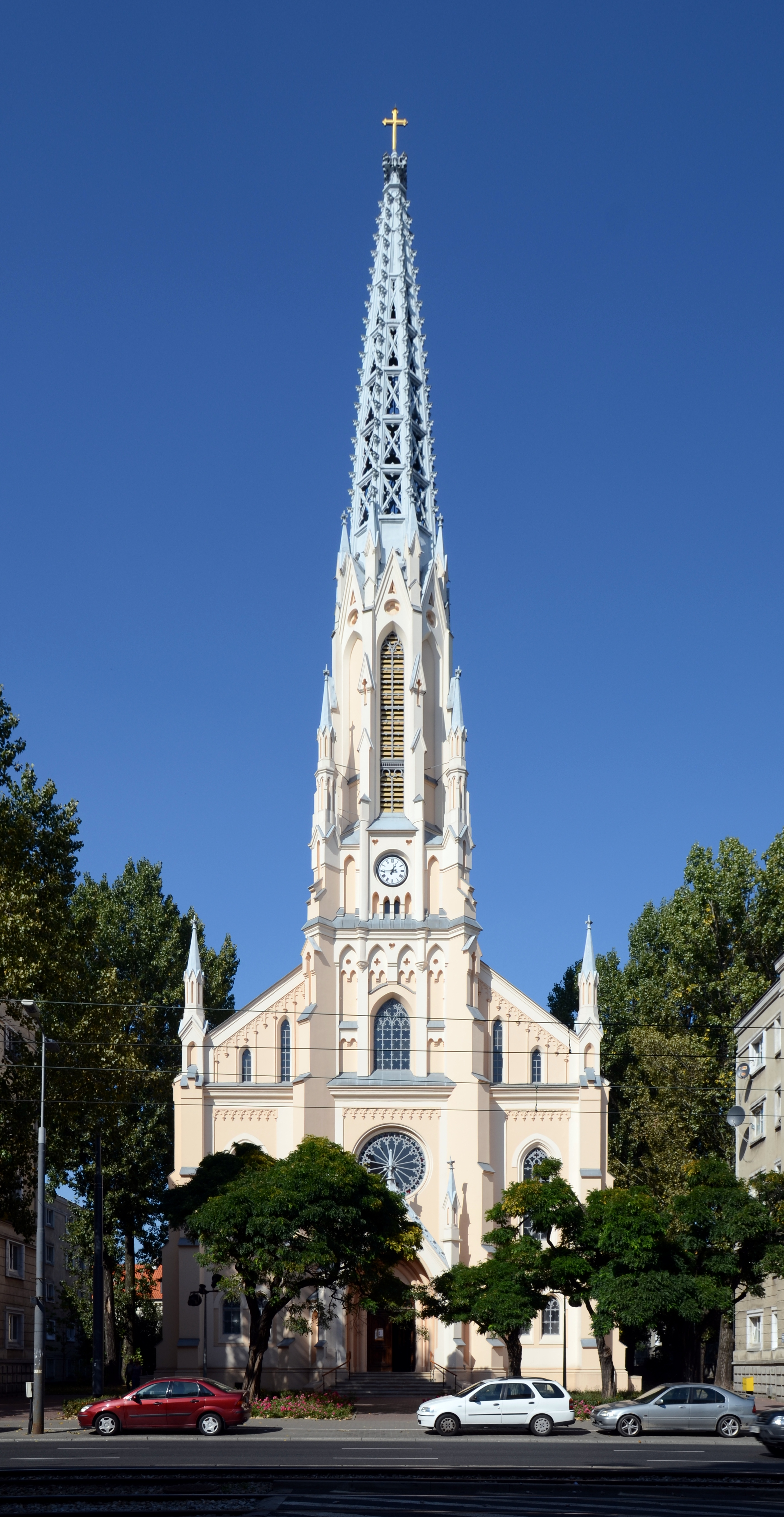 Kościół parafii ewangelicko-reformowanej przy al. "Solidarności" w Warszawie.